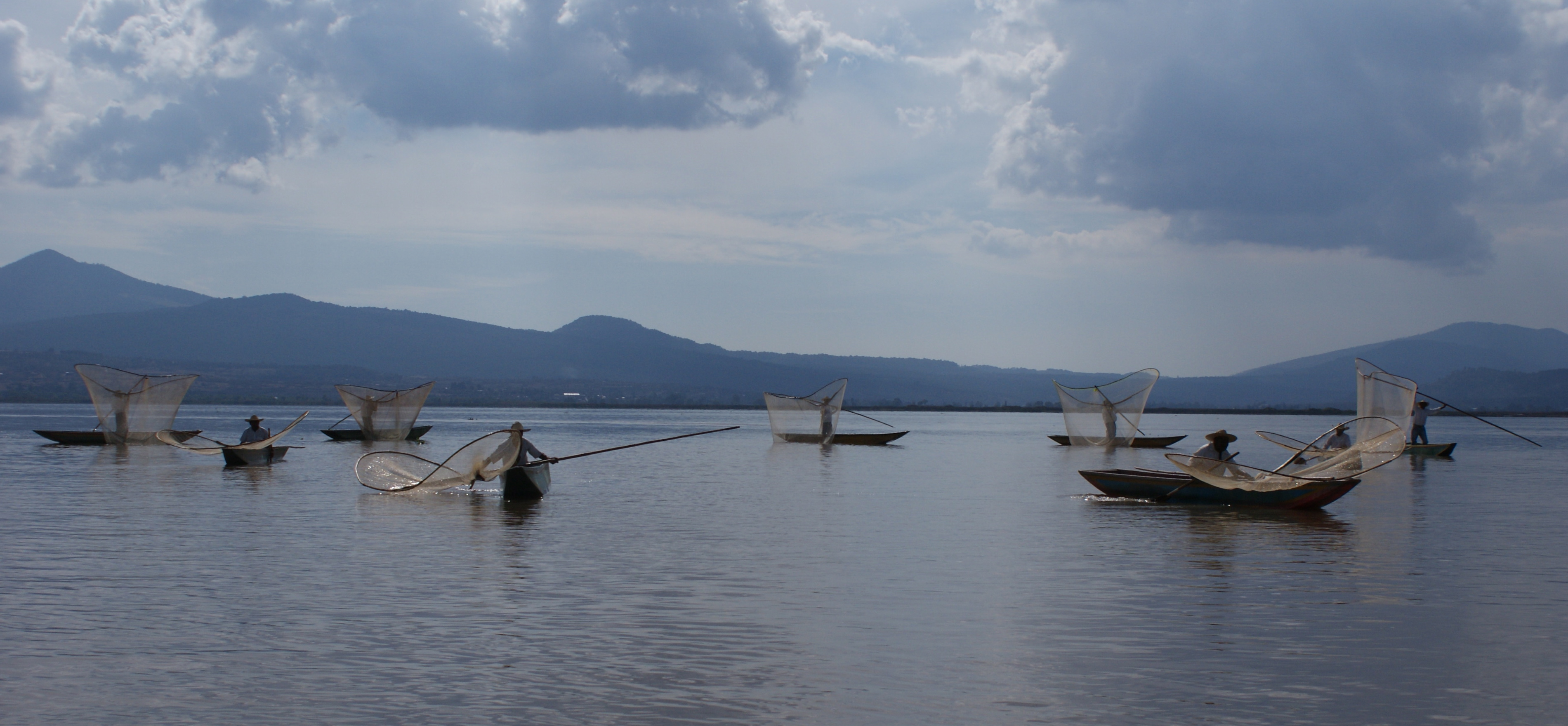 GRUPO DE BALSEROS SOBRE LAGO DE PÁTZCUARO MICHOACÁN, DONDE ELLOS HACEN UN ESPECTÁCULO VISUAL ON SUS REDES DE PESCA, PARA QUE LO APRECIEN LOS TURISTAS QUE VAN DE VISITA